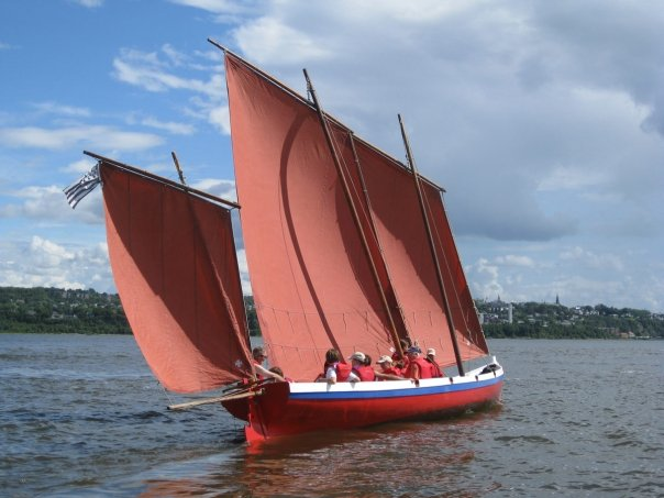 Yole de Bantry Volonté à la voile. Naviguant avec l'équipage de l'association Treizour, en baie de Douarnenez. Ce bateau gréé avec trois voiles au tiers. Le tapecul à l'arrière, le taillevent au centre et la misaine à l'avant du bateau.